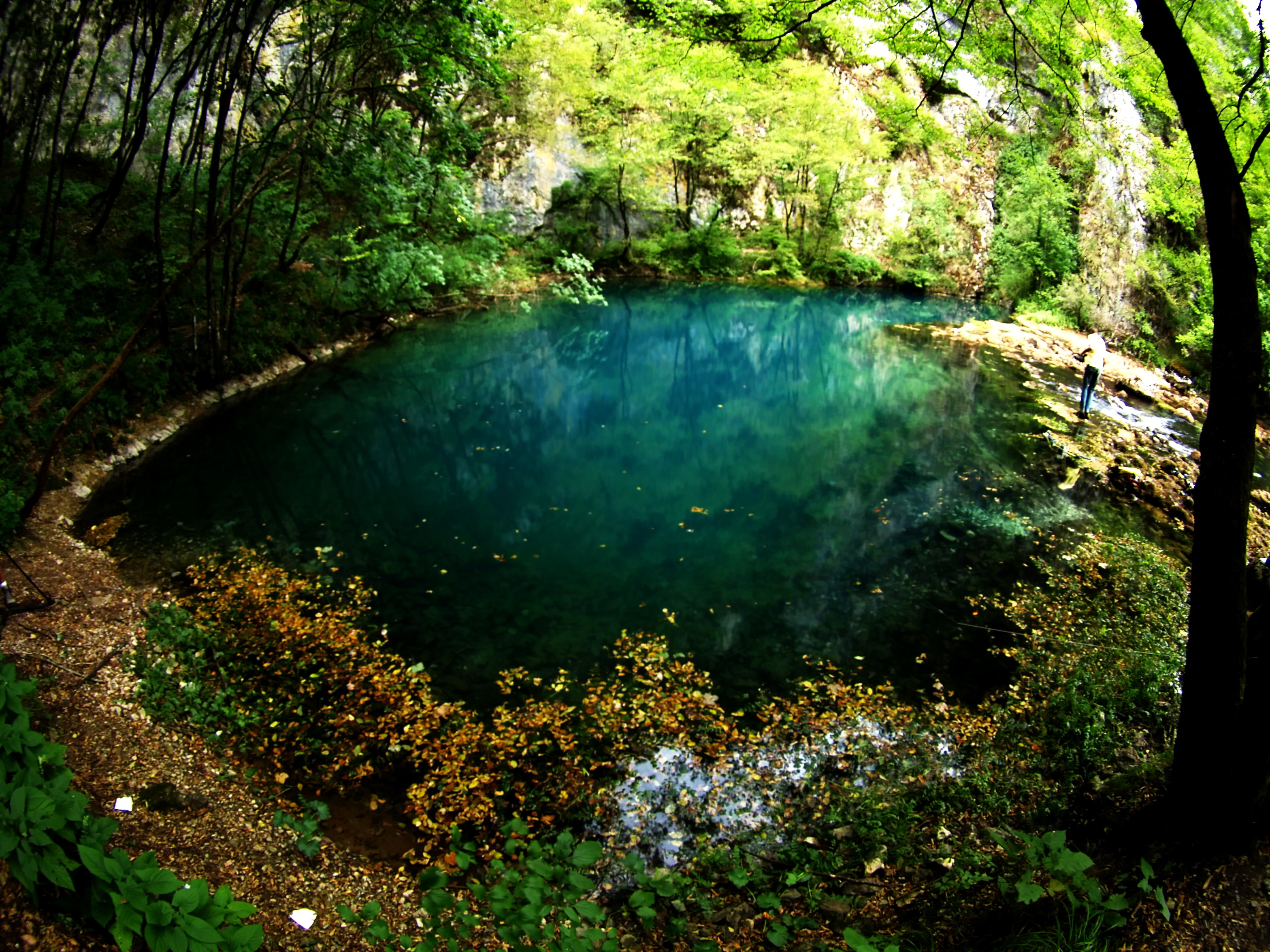 Vrelo Une